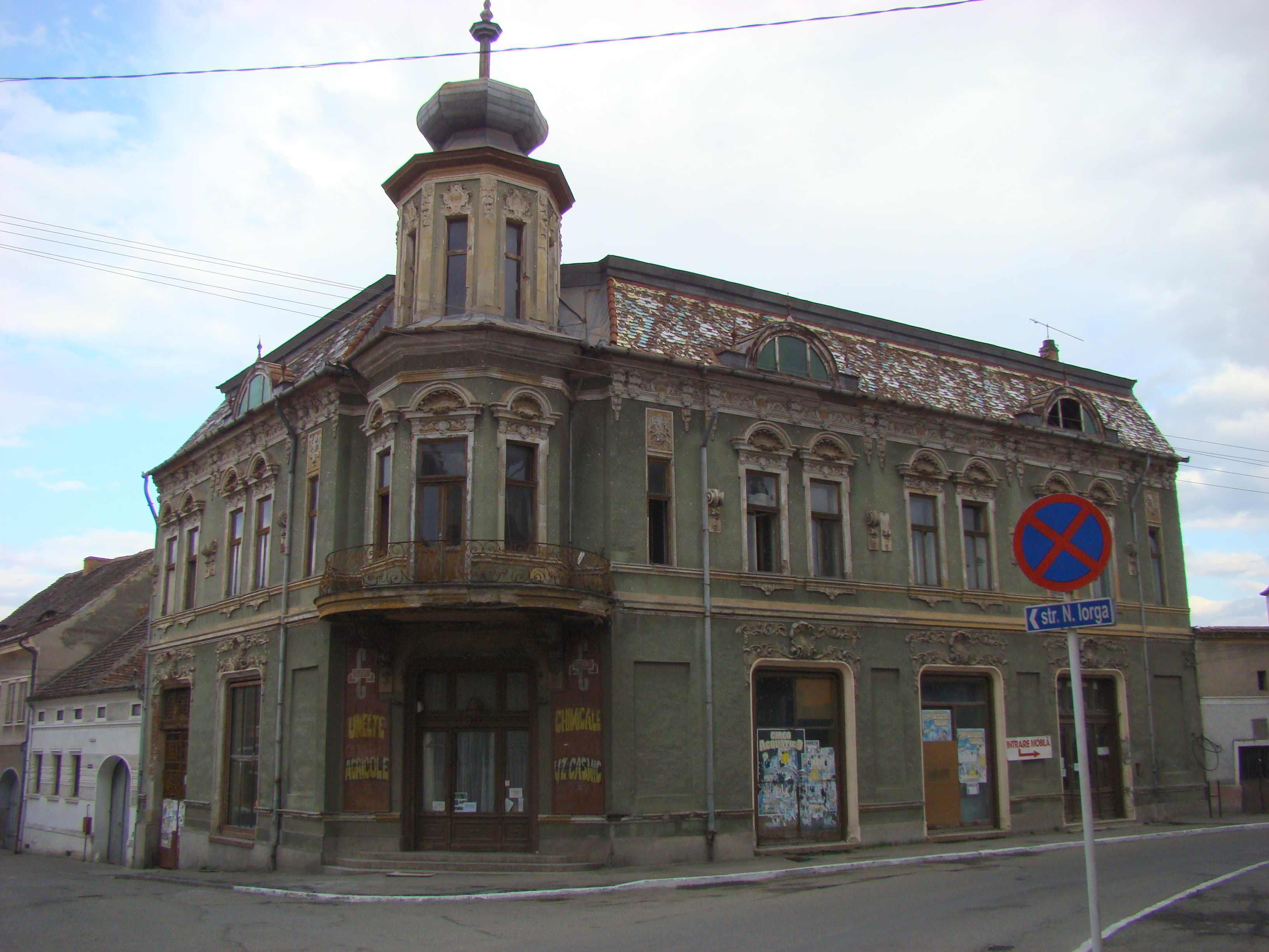 Magazinul "Vulcu"